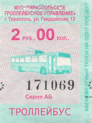 Билет на новый троллейбус в Тирасполе. По состоянию на декабрь 2012 года в Тирасполе действует два тарифа для проезда в троллейбусах. Стоимость проезда: в старом троллейбусе=1,7 руб. в новом троллейбусе (АКСМ-321)= 2,0 руб.